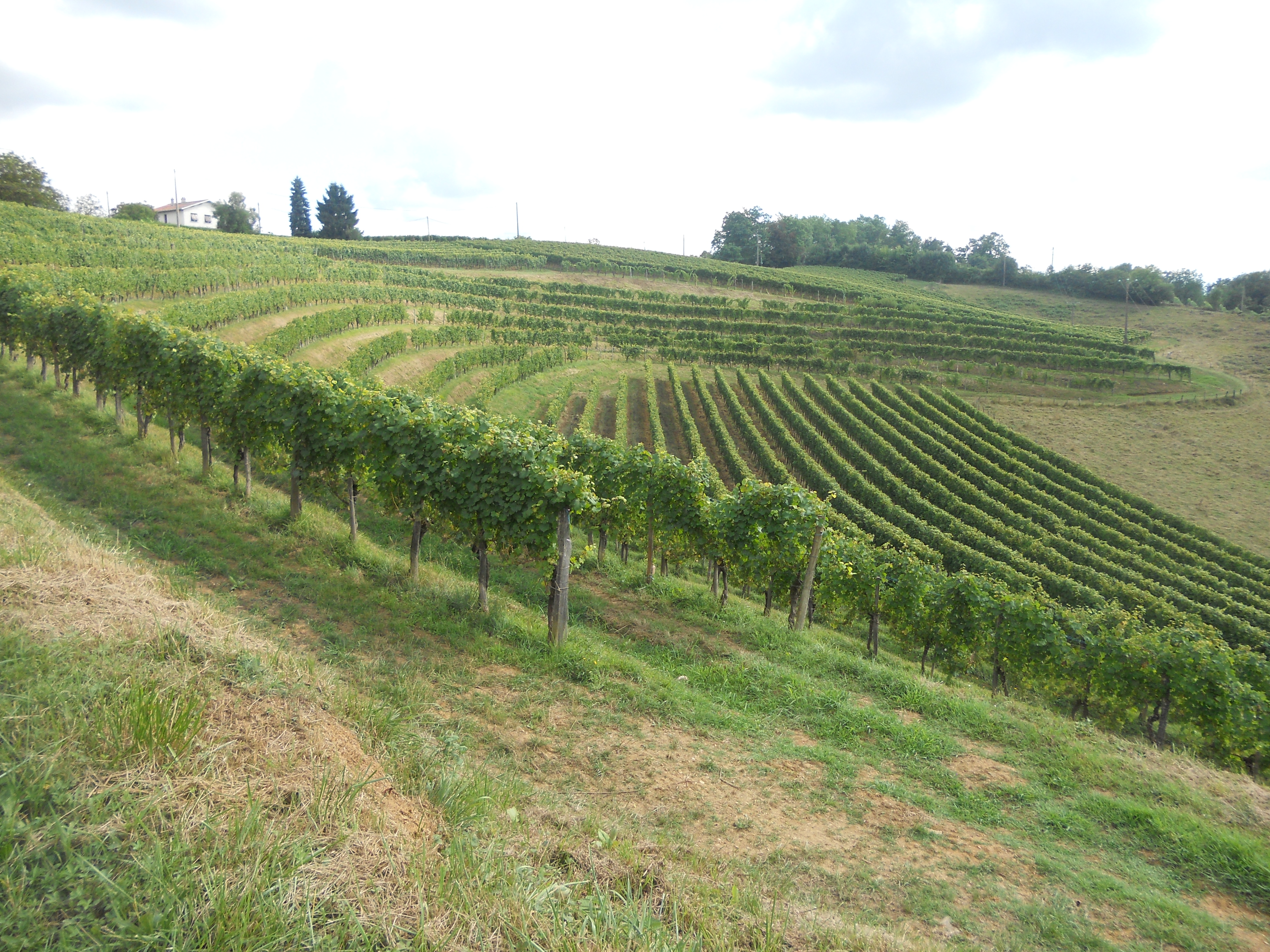 Les coteaux de Jurançon vers le clos Lapeyre